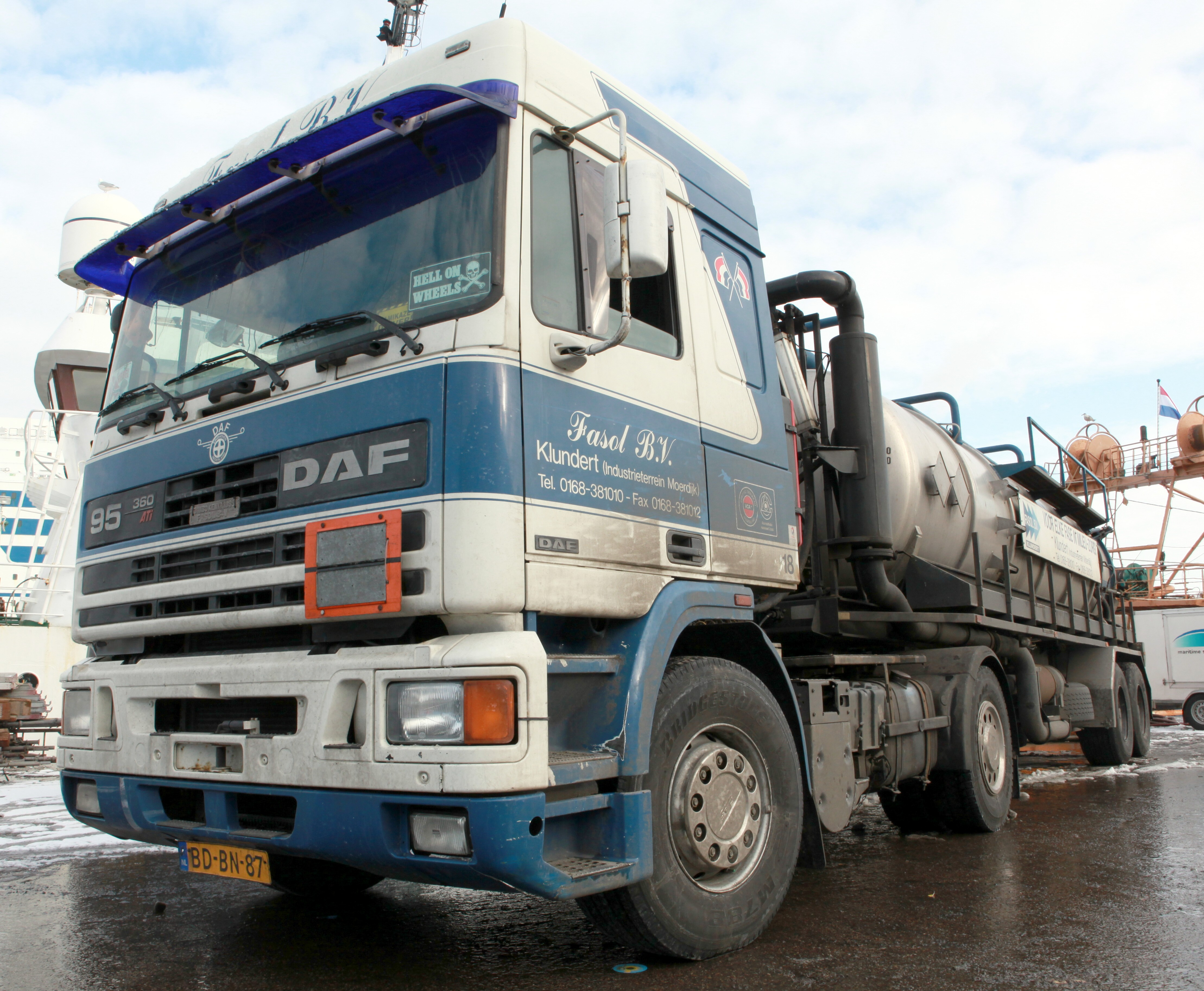 Daf 95.360 ATI Fasol B.V. Klundert